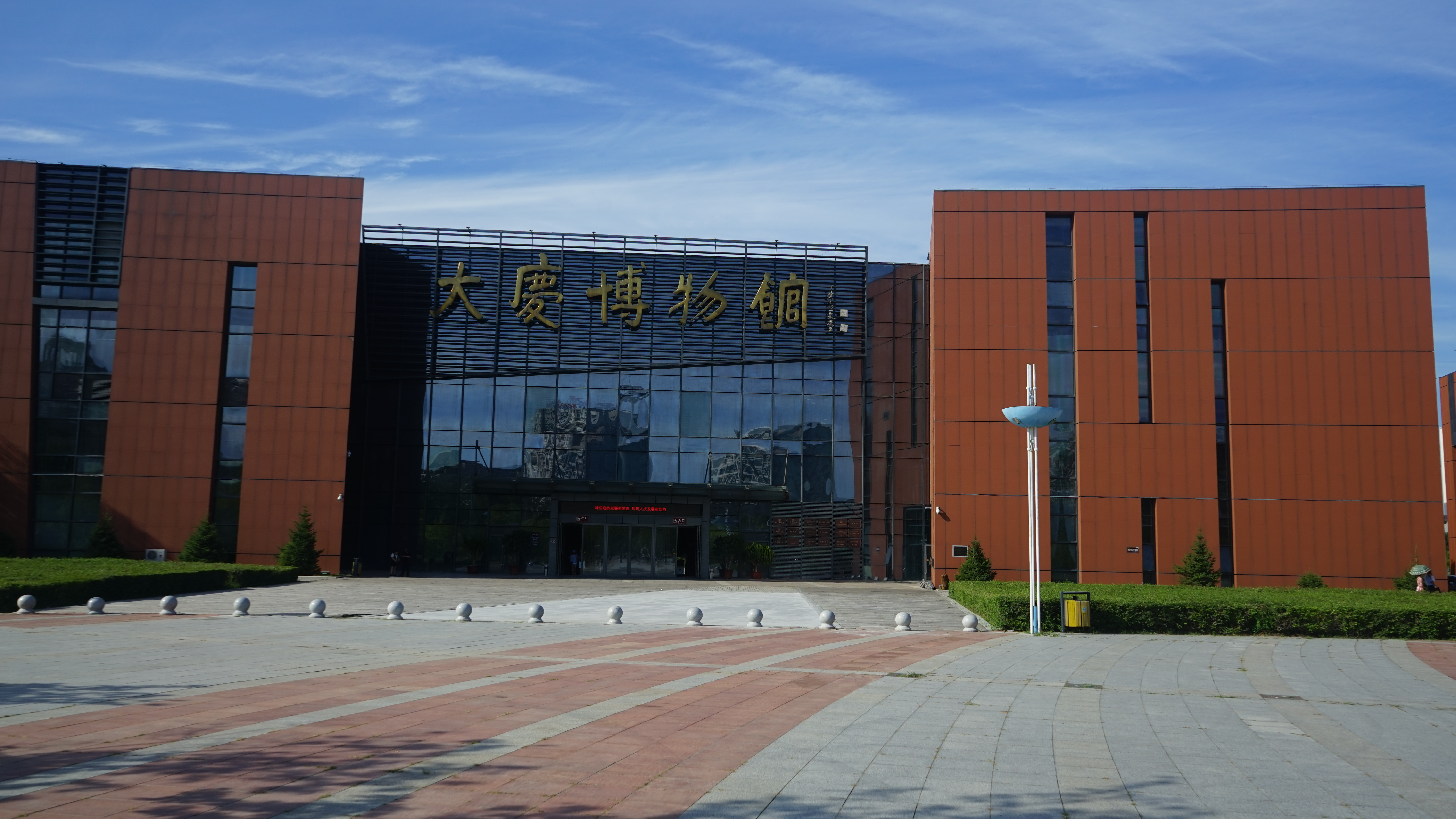 中文（中国大陆）: 大庆博物馆正面